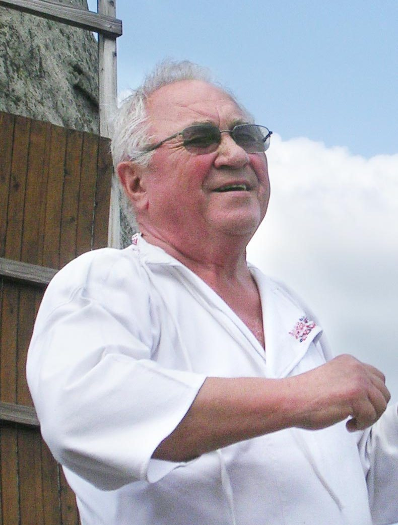 Luboš Holý, Horňácké slavnosti 2007 (Kuželov, 22.7.2007)